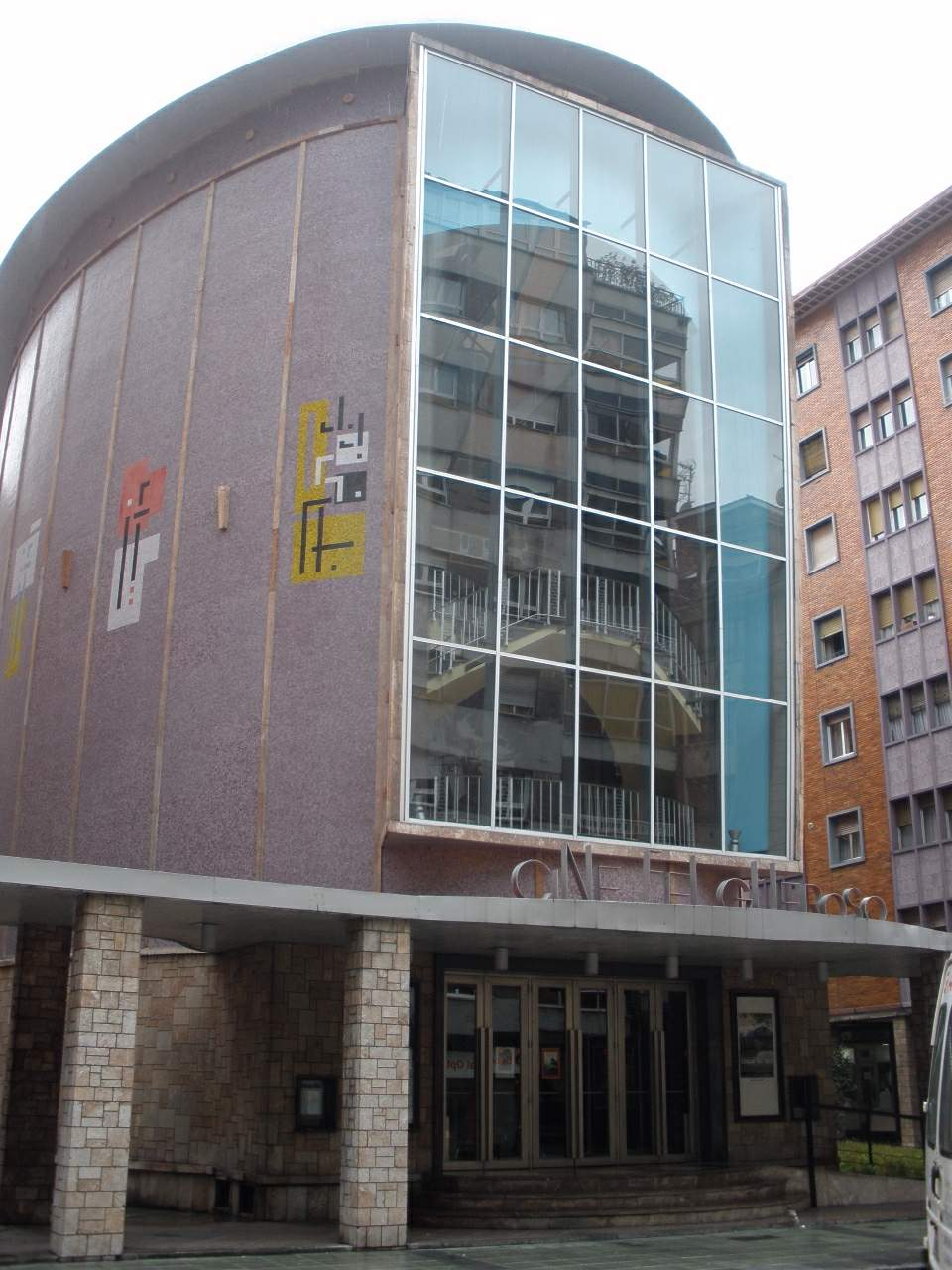 Paisaje urbano de Sama de Langreo (Asturias)